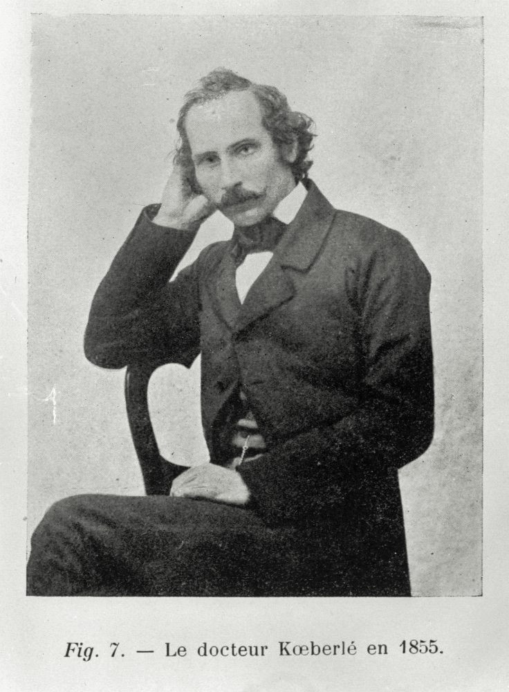 Réf. image : 02235 Portrait de Koeberlé en 1855 20e siècle Auteur de l'ouvrage : PICHEVIN, R. Ouvrage : Le docteur Koeberlé et son oeuvre Edition : Strasbourg : Revue Alsacienne, 1914 Cote : 067207 Empl. de l'image : p. 36 bis Taille originale : in 8° mm Technique : Impr. photomécanique - Photogravure Fiches bio-bibliographiques : KOEBERLE (Eugène) - Adresse permanente de cette image